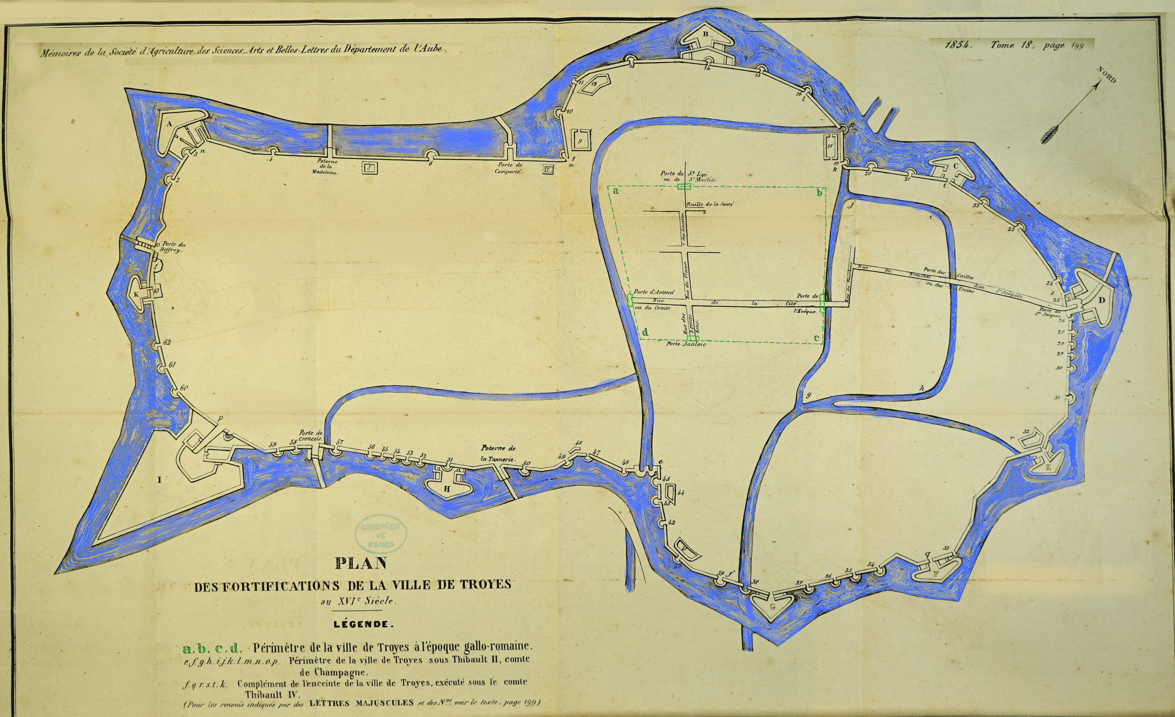 vue de cf titre